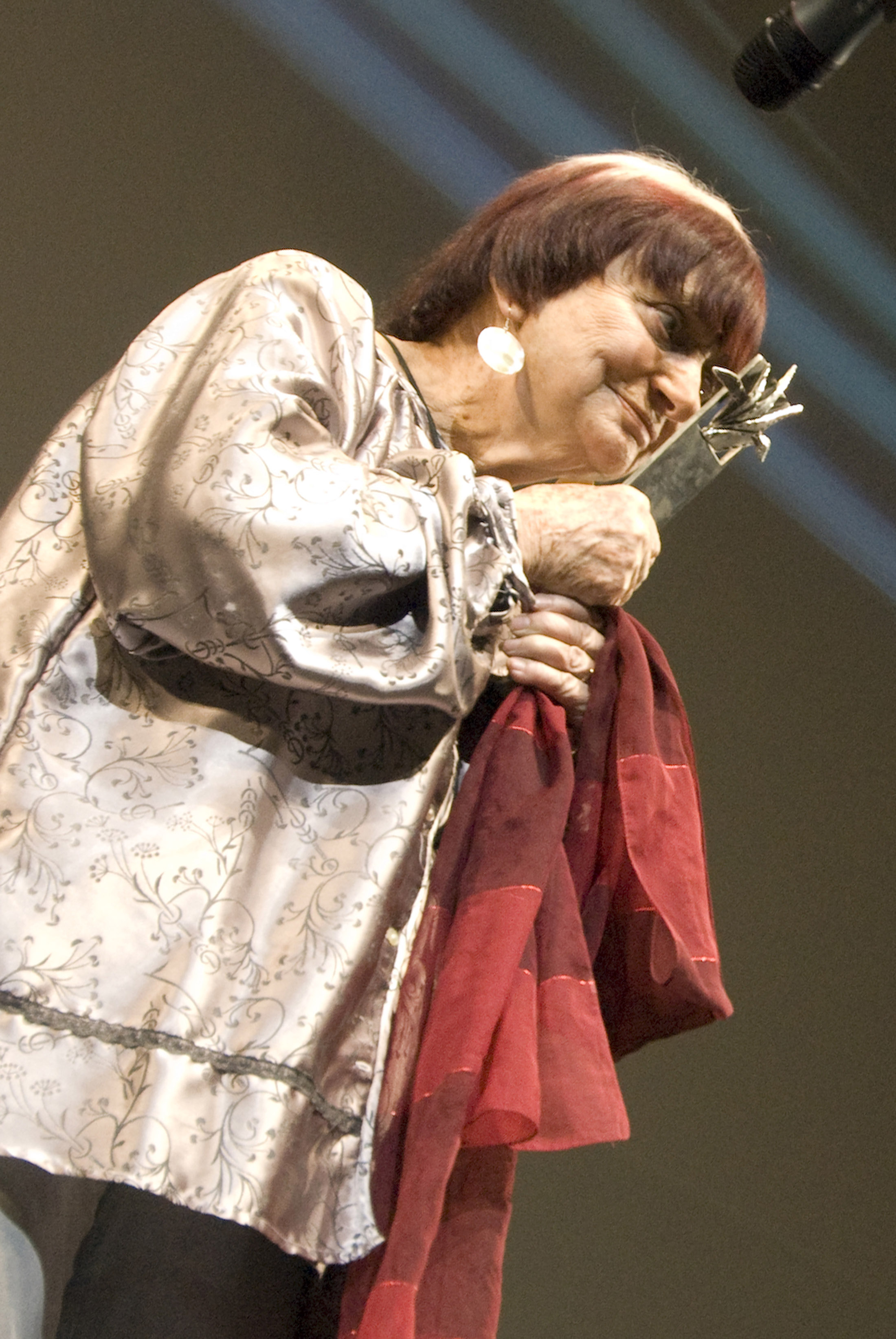 Mayahuel de plata a Agnés Vardá, directora francesa, en el marco de las actividades del Festival Internacional de Cine de Guadalajara en su edición 25. 18 de Marzo, 2010. Guadalajara, México. © Cortesía FICG25 / Michel Amado Carpio.